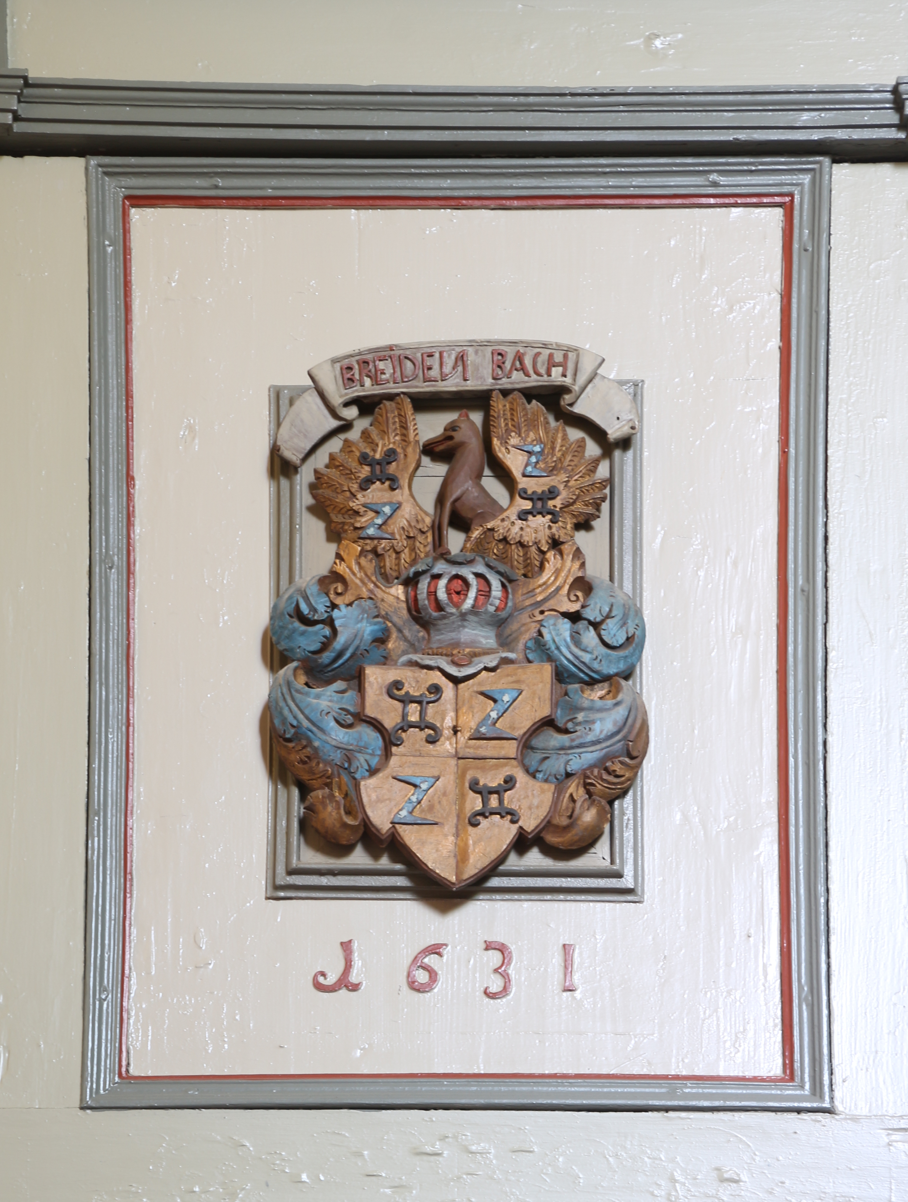 Evangelische Kirche Breidenbach, Landkreis Marburg-Biedenkopf, Hessen